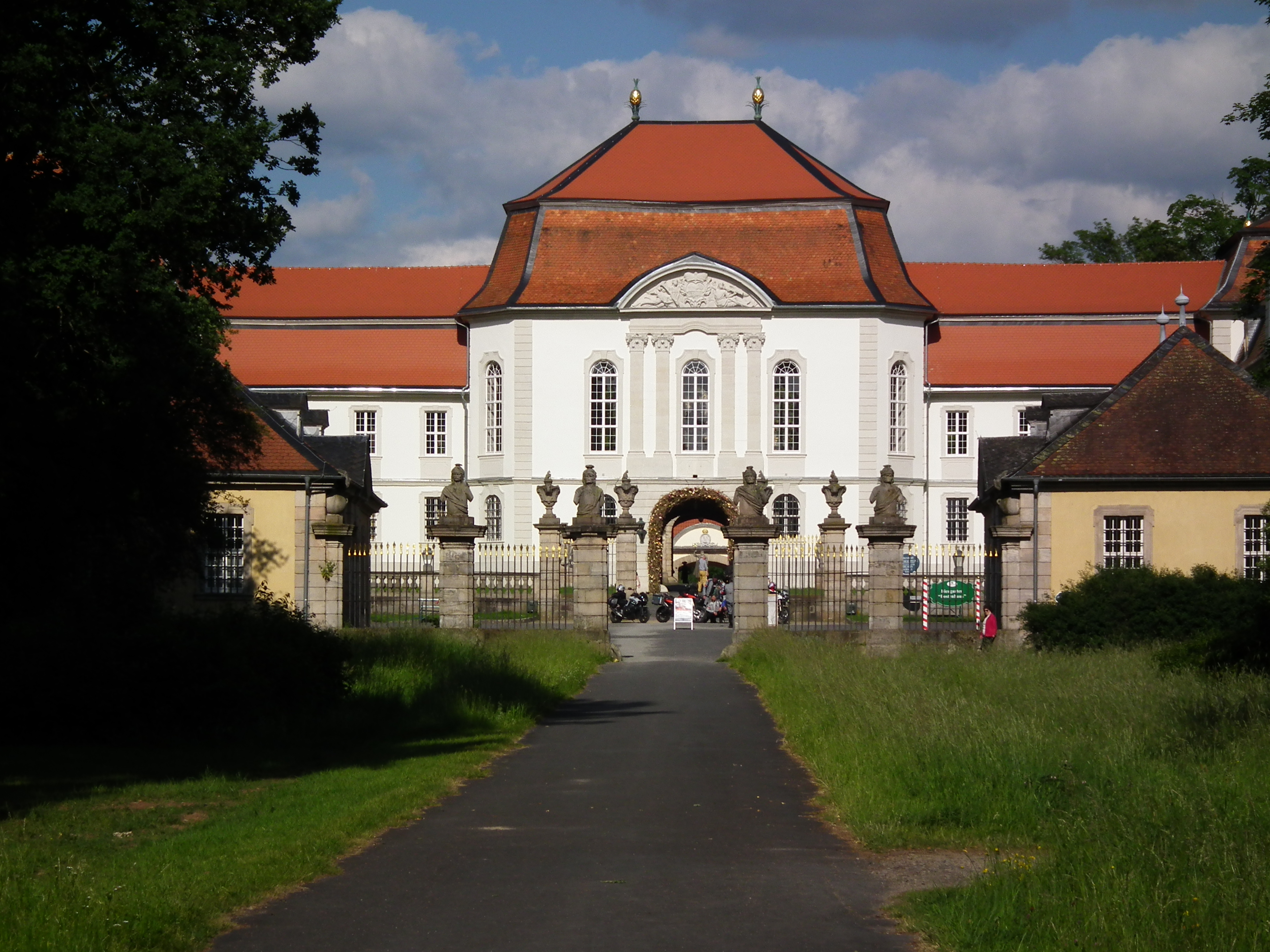 Schloss Fasanerie in Eichenzell bei Fulda (Hessen, Deutschland)